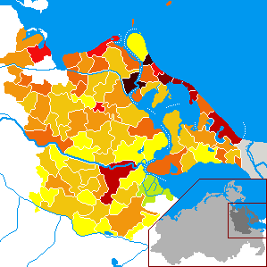 Bevölkerungsdichte Landkreis Ostvorpommern